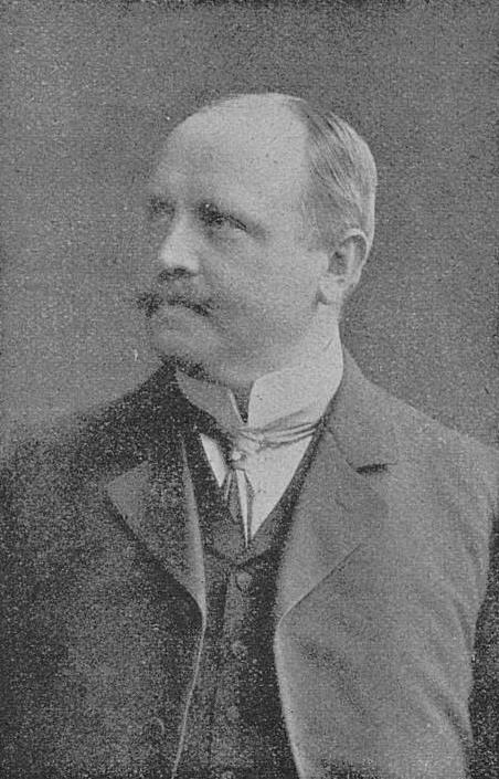 Porträtfoto von Walther Hartmann